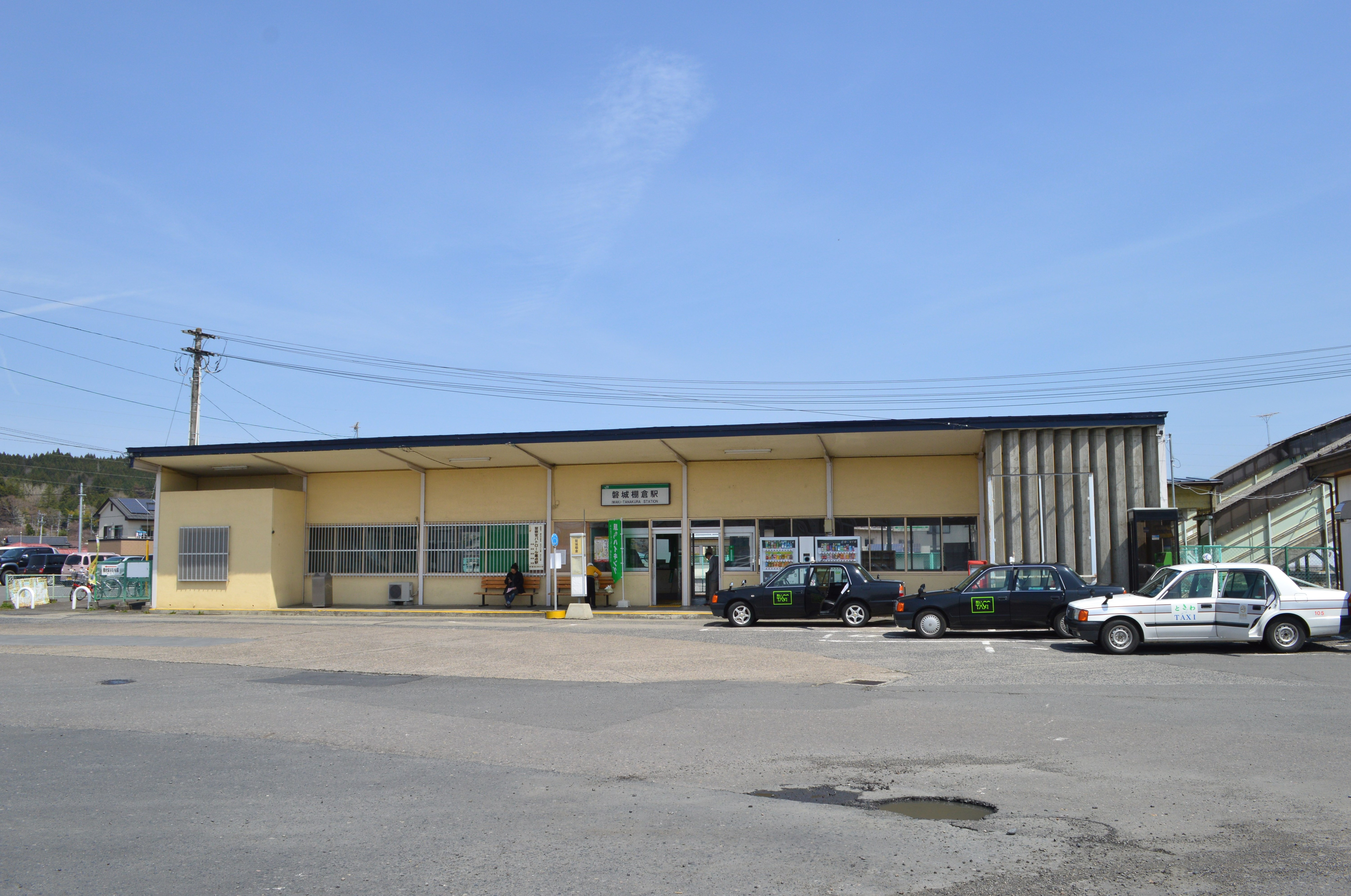 磐城棚倉駅 駅舎